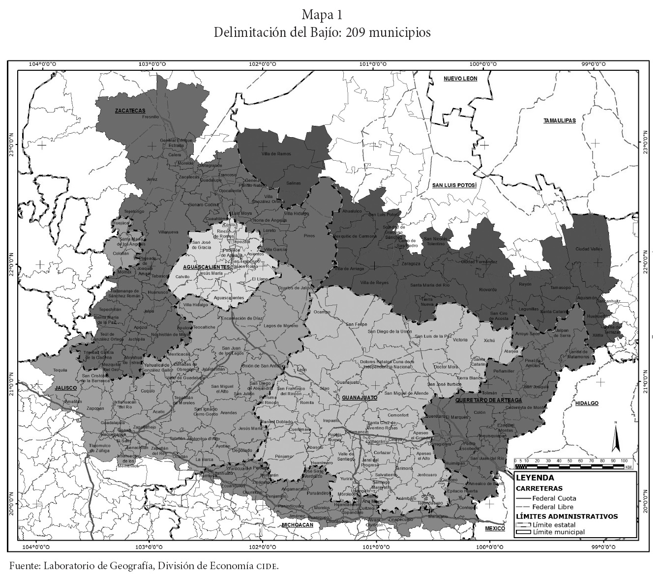 Mapa que muestra los limites del Bajío, así como que municipios lo conforman.